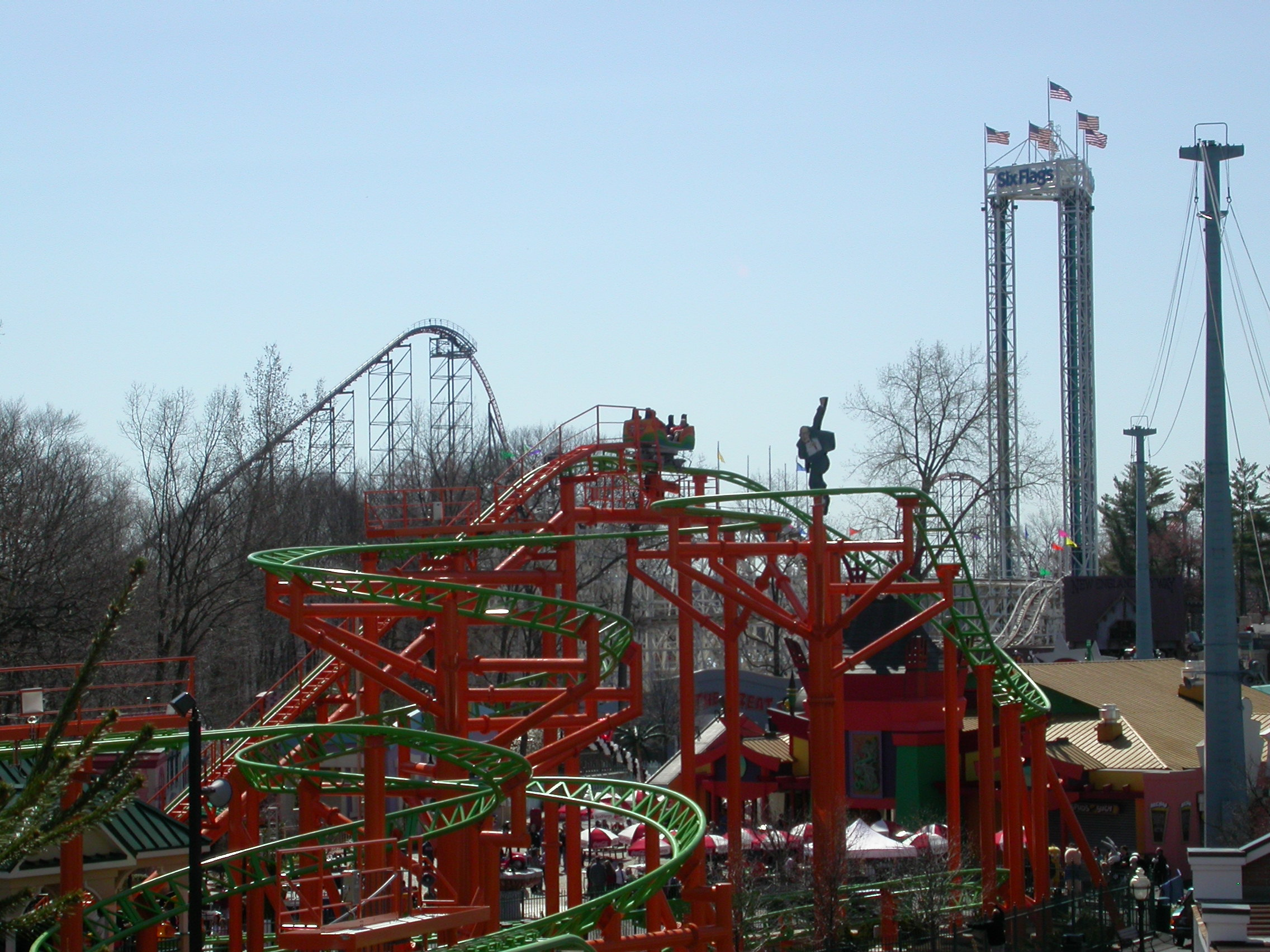 Gerstlauer Spinning Coaster Pandemonium (Six Flags New England)